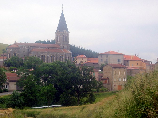 Chirassimont Vue générale